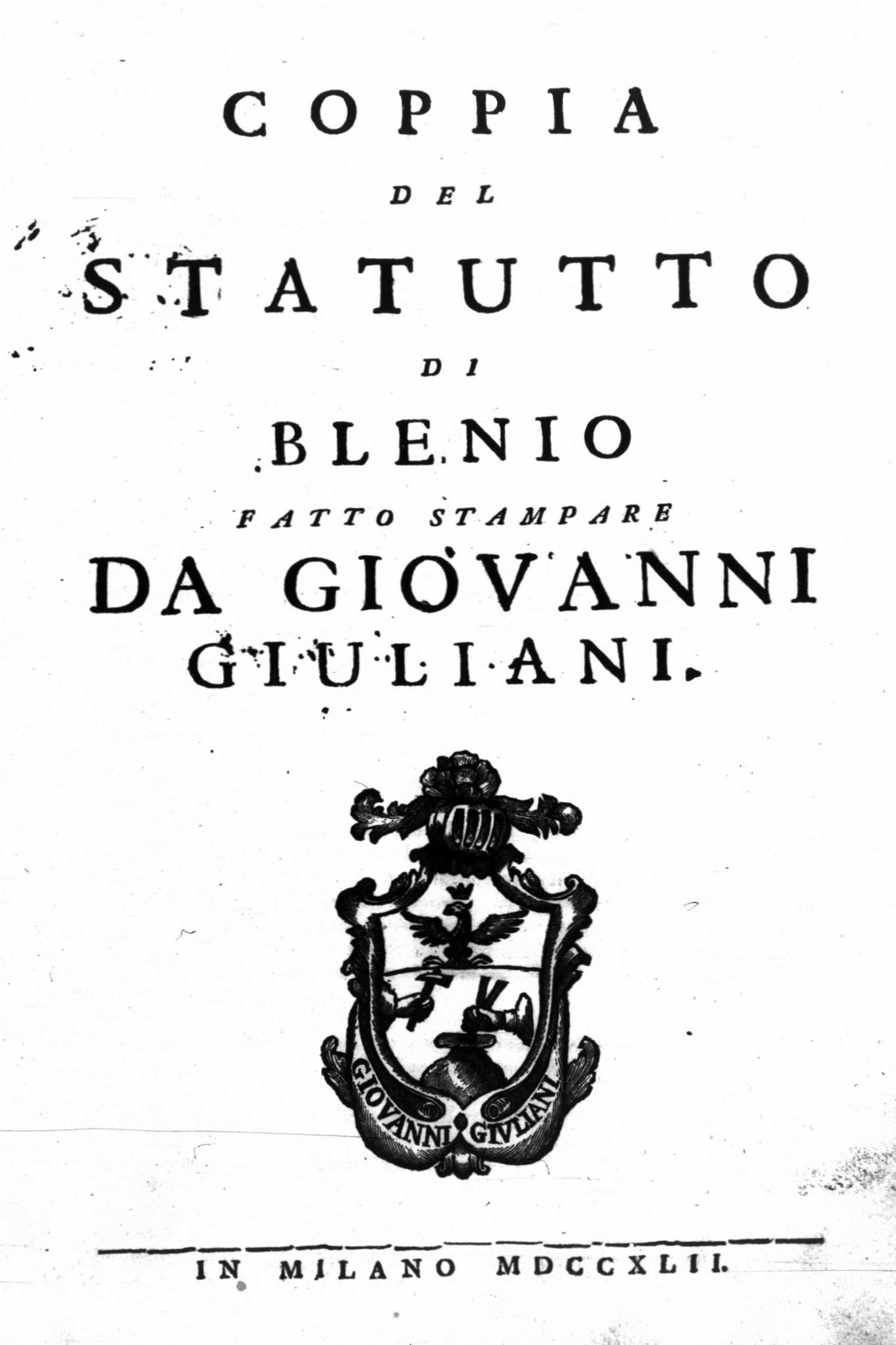 Frontespizio